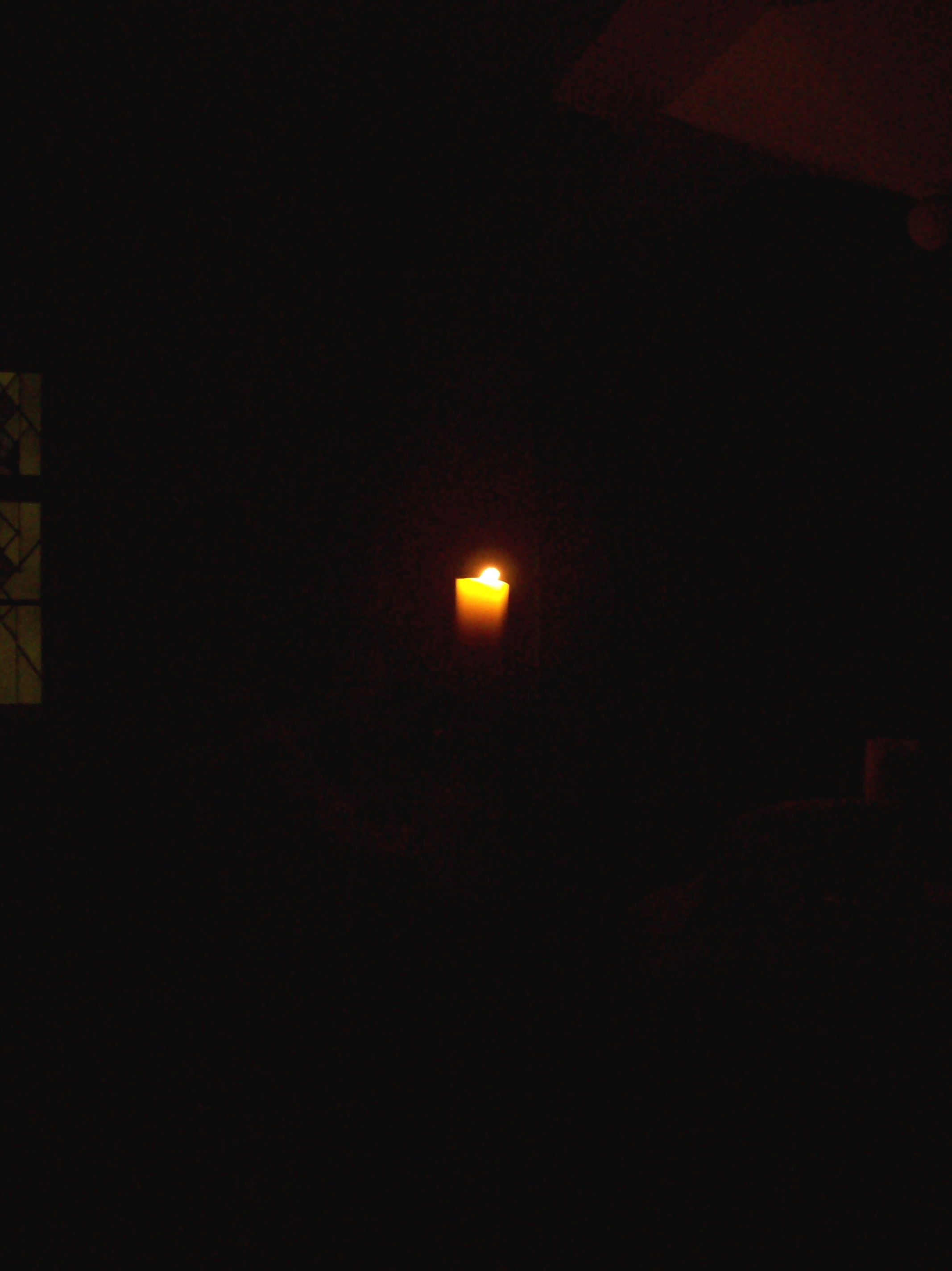 Osternachtsfeier in der Kirche der kreuznacher diakonie. Die Osterkerze leuchtet in der dunklen Kirche. Der Praecentor stimmt das "Christus, Licht der Welt" an - die Gemeinde antwortet "Gott sei ewig Dank".